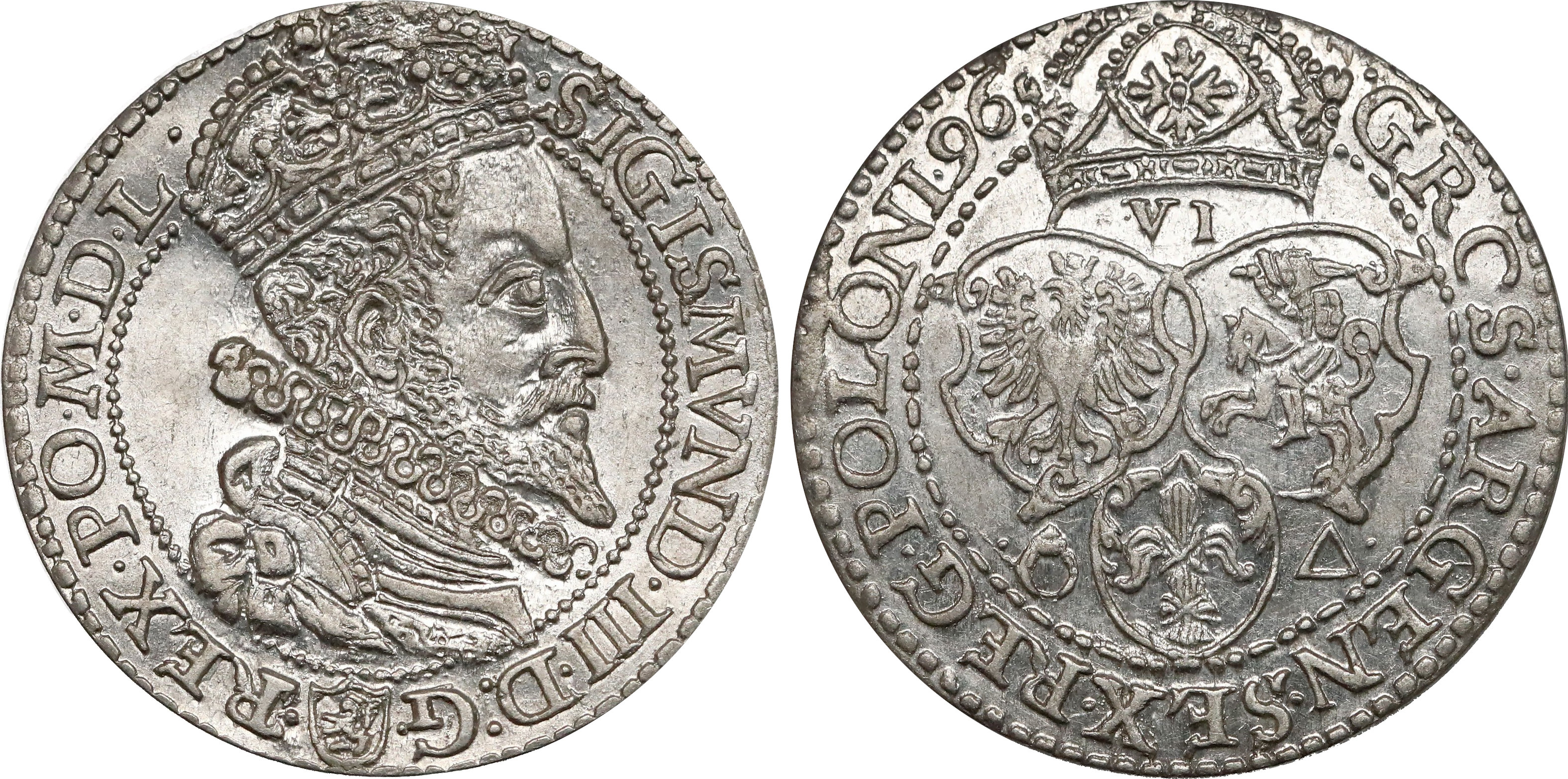 Szóstak koronny 1596 Malbork